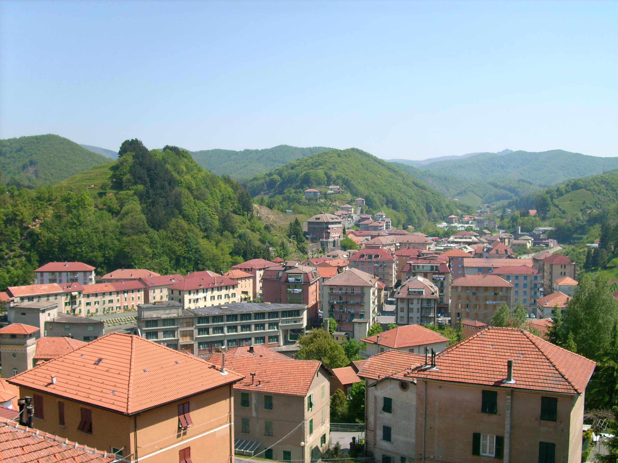 Masone, Liguria, Italia